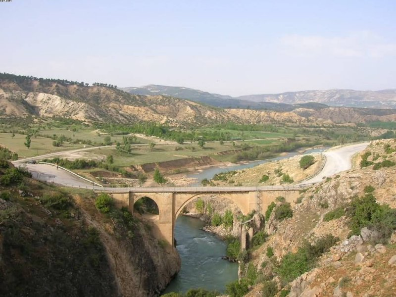 kişisel resim